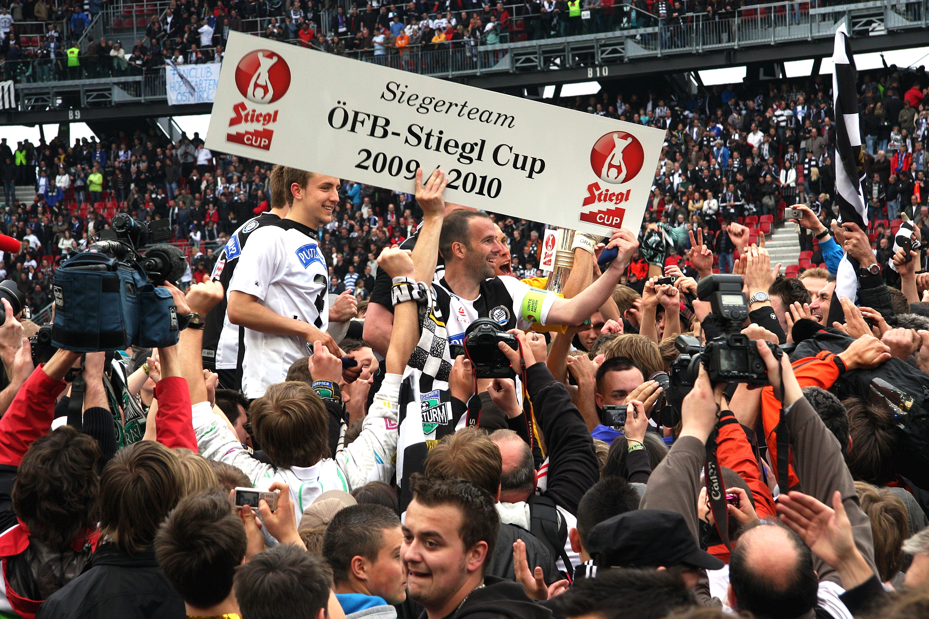 Endspiel im Österreichischer Fußball-Cup 2009/10 SC Magna Wiener Neustadt gegen SK Sturm Graz 0:1 (0:0) am 16. Mai 2010 im Wörtherseestadion in Klagenfurt - Die Spieler des SK Sturm Graz jubeln über den Sieg im ÖFB-Cup 2010. Kapitän Mario Haas zeigt den jubelnden Fans den Werbebanner. (Bild 3)